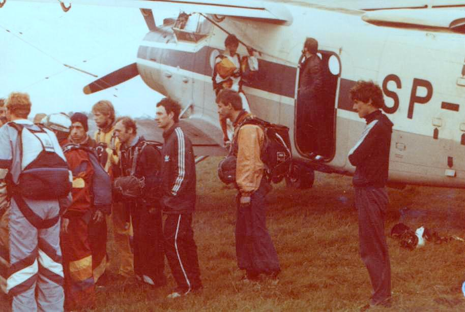 XV Spadochronowe Mistrzostwa Śląska Gliwice 1984, An-2TD SP-ANW. Tradycyjne po zakończonych zawodach przymierzono się do „wielkiej kupy“ - Sekcja Spadochronowa Aeroklubu Gliwickiego